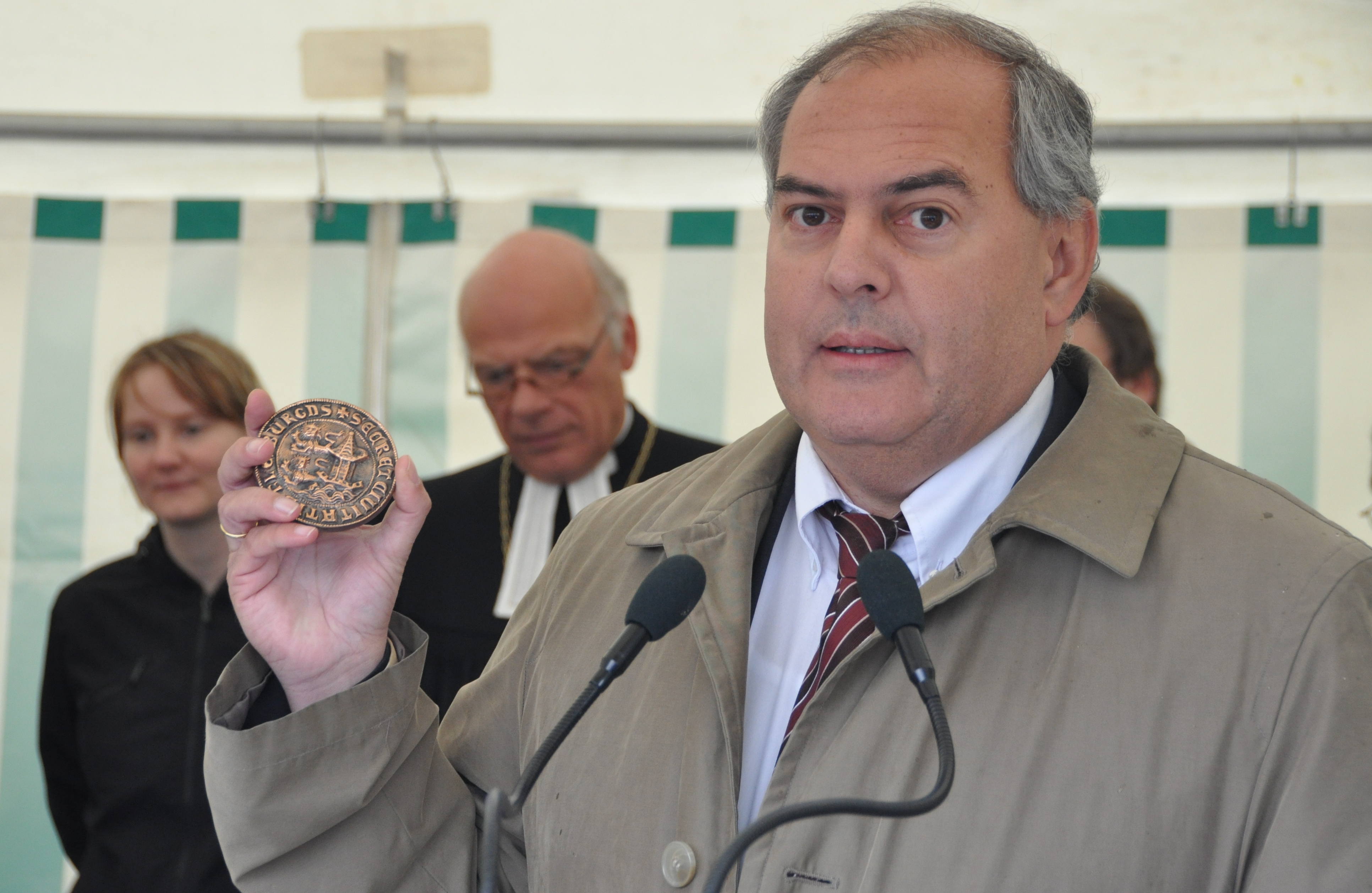 Klaus Tscheuschner, Oberbürgermeister von Flensburg, Deutschland, hier mit dem Flensburger Stadtwappen bei der Grundsteinlegung für die Kapelle Campelle auf dem Campus der Universität Flensburg. (Foto: Pittkowski)